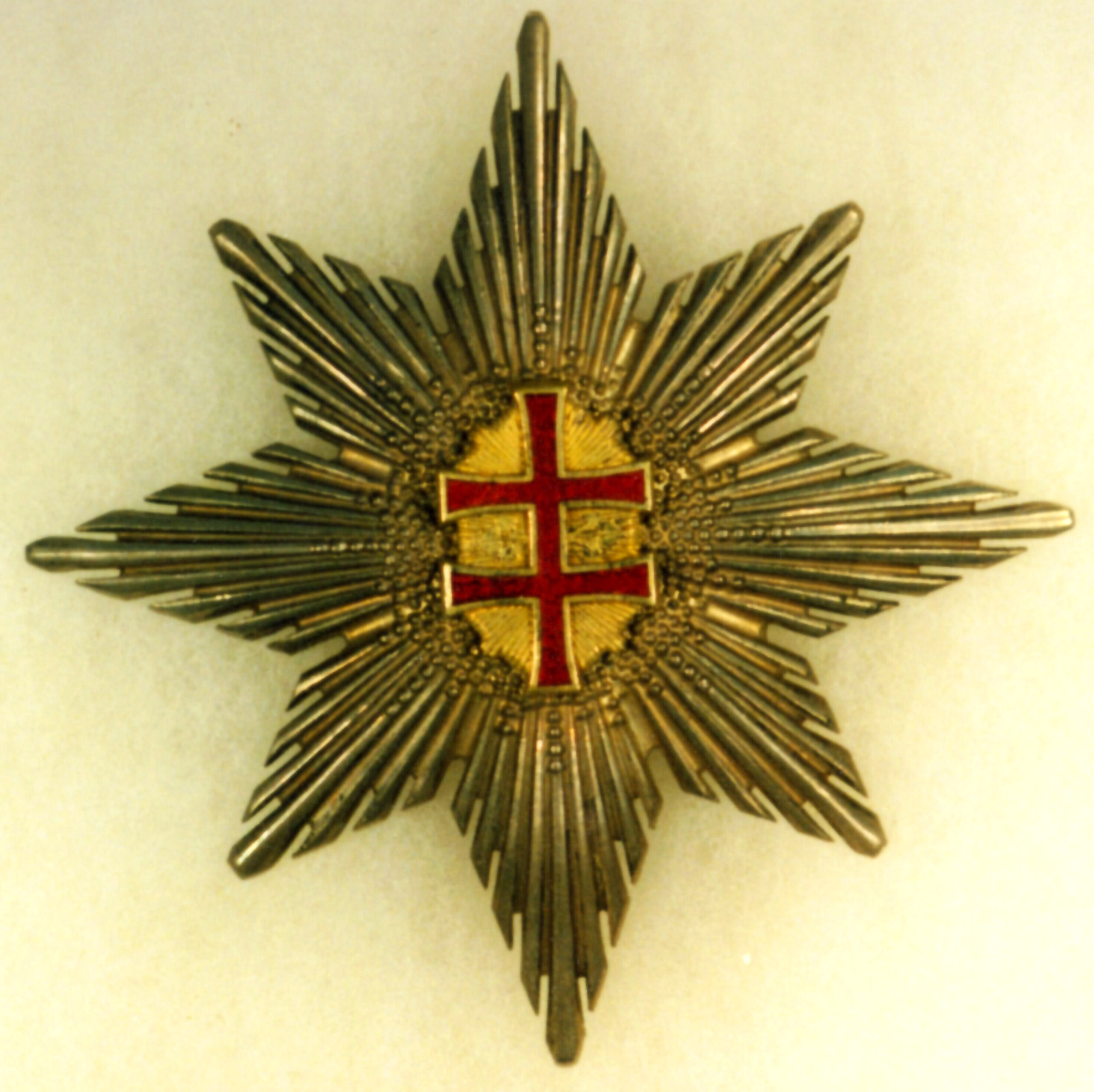 Hviezda z vojenského významenania Vojnového víťazného kríža Slovenskej republiky 1939 -1944. Jej autorom bol Anton Hám, Štefan Ondrkal a Štefan Grosch.